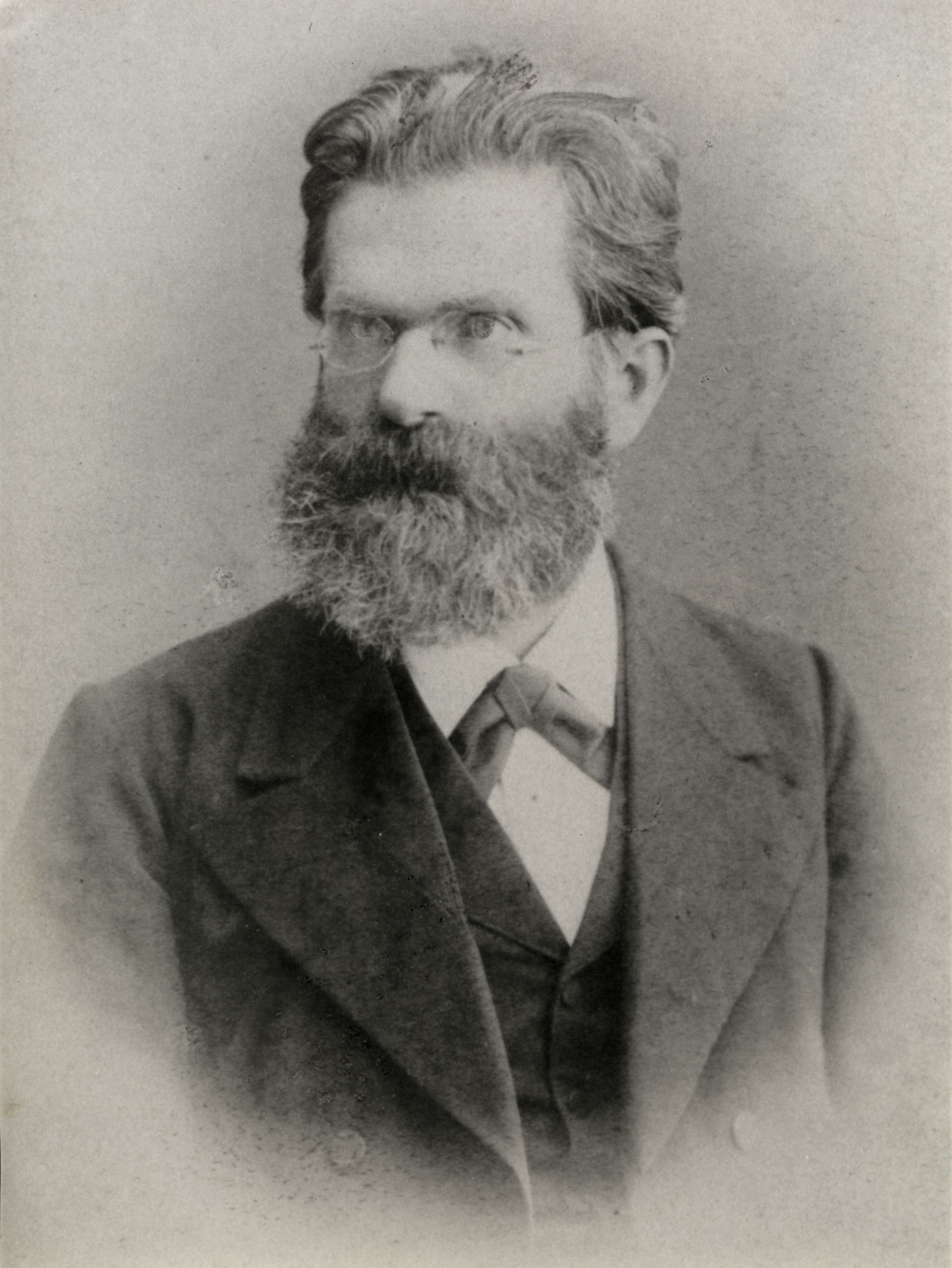 Photo - Portrait des Karl Weysser (1833-1904)